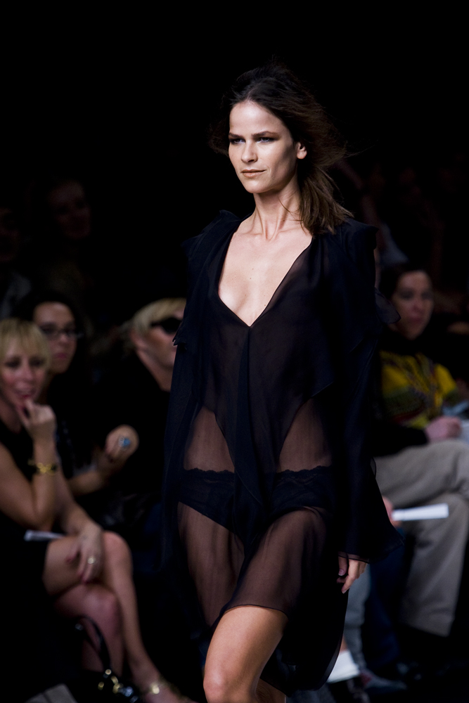 Erika na Moda Lisboa 2008